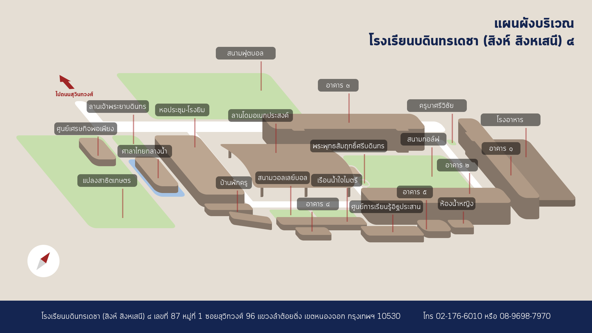 แผนผังโรงเรียนบดินทรเดชา (สิงห์ สิงหเสนี) ๔